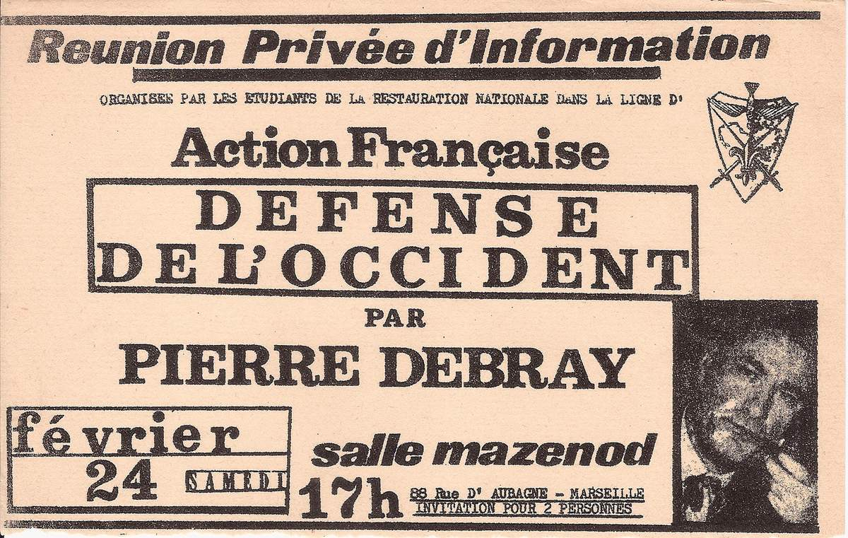 Réunion organisée par l'Union Royaliste Provençale à Marseille. L'extrème-gauche tentera de l'interdire et Pierre Debray y fera le "coup de poing" avant de terminer sa conférence.